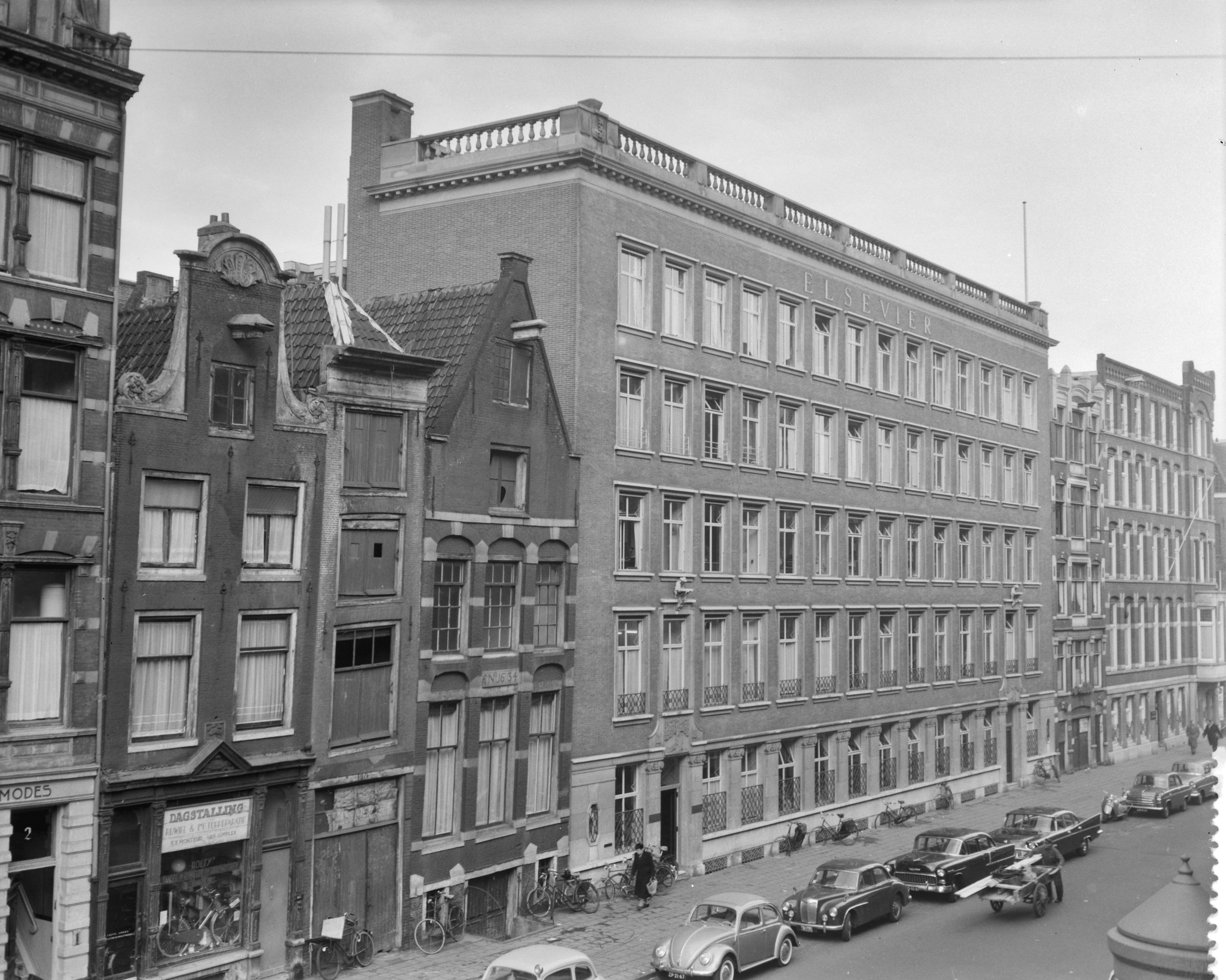 Collectie / Archief : Fotocollectie Anefo Reportage / Serie : [ onbekend ] Beschrijving : Gebouw Elsevier aan de Spuistraat te Amsterdam Datum : 3 december 1958 Locatie : Amsterdam, Noord-Holland, Spuistraat Trefwoorden : gebouwen, gevels, stadsbeelden Fotograaf : Rossem, Wim van / Anefo Auteursrechthebbende : Nationaal Archief Materiaalsoort : Negatief (zwart/wit) Nummer archiefinventaris : bekijk toegang 2.24.01.04 Bestanddeelnummer : 910-0148